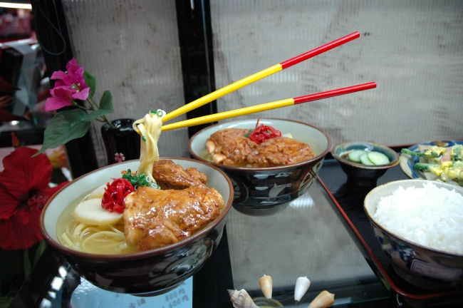 沖縄そばの食品サンプル（沖縄）soba-n-invisibleman